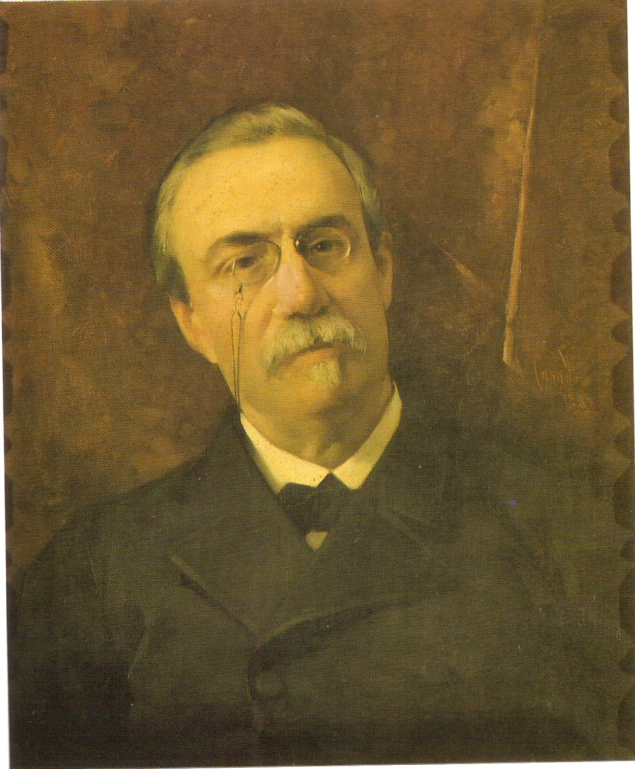 Retrato del politico español Antonio Cánovas del Castillo (1828-1897).